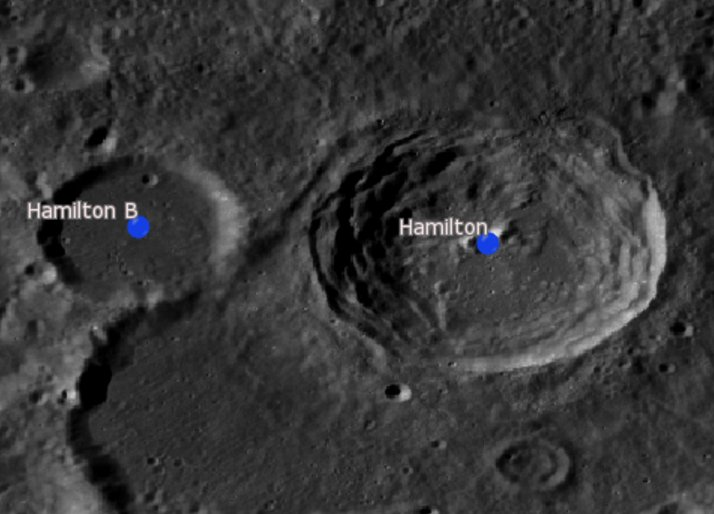 Cráter lunar Hamilton. Cráteres satélite. (Imagen LRO)